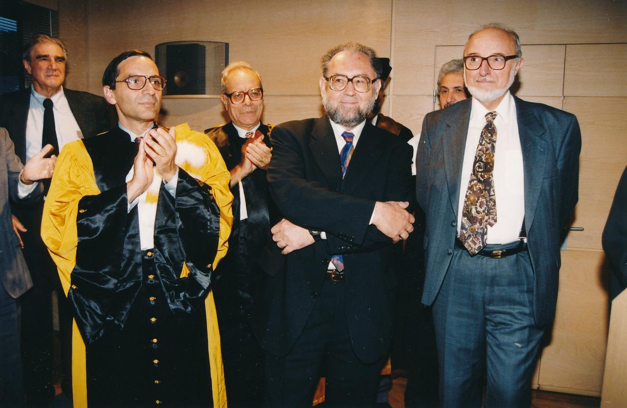 Saint-Dié-des-Vosges, Festival international de géographie (FIG), octobre 1996. De gauche à droite : Jean Malaurie, président du FIG 1996 Rémy Knafou Roland Paskoff Roger Brunet, lauréat du prix Vautrin Lud Paul Claval, lauréat du prix Vautrin Lud Photo d'archive personnelle scannée.